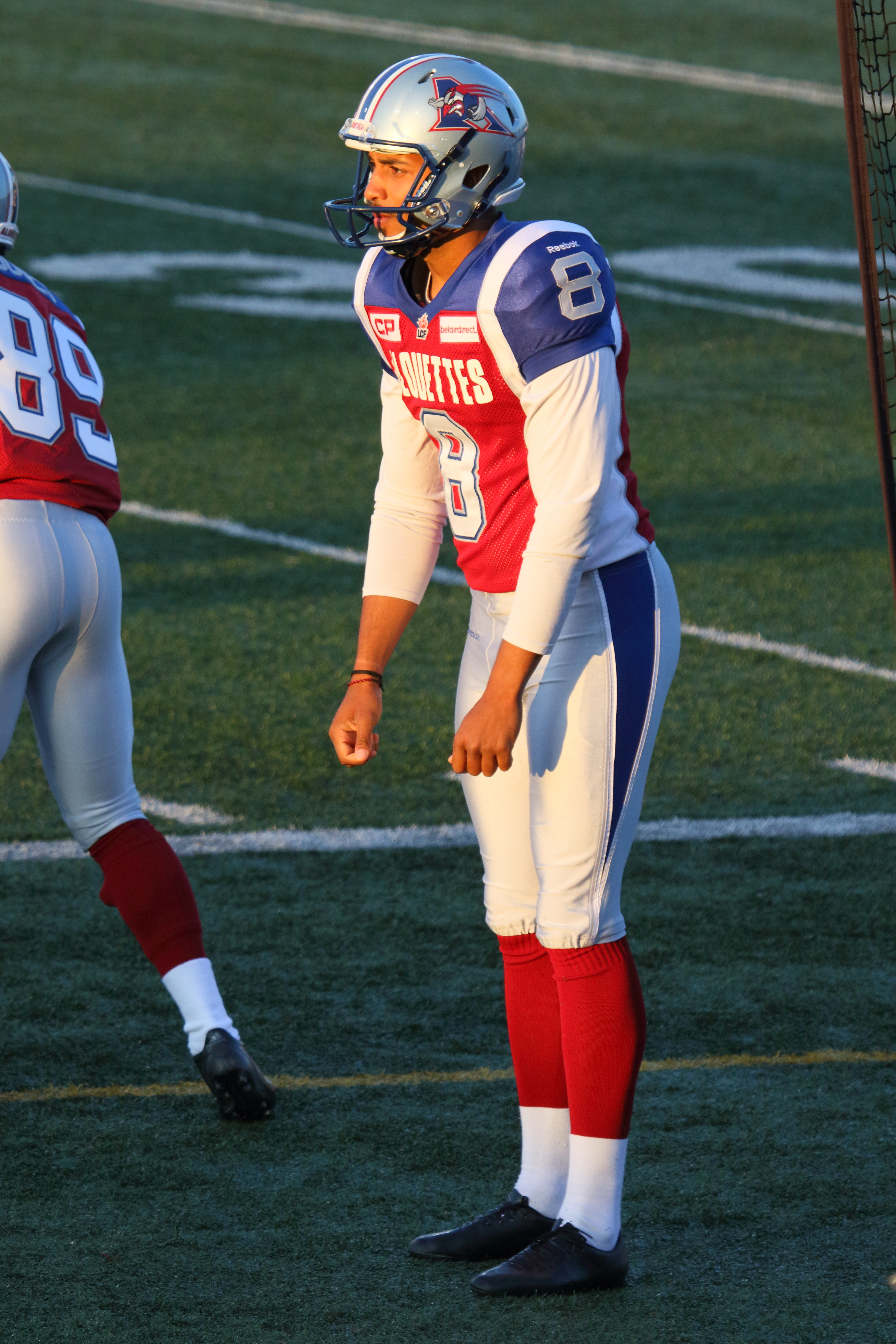 Boris Bede, Alouettes de Montréal, lors d'un match préparatoire contre le Rouge et Noir d'Ottawa.